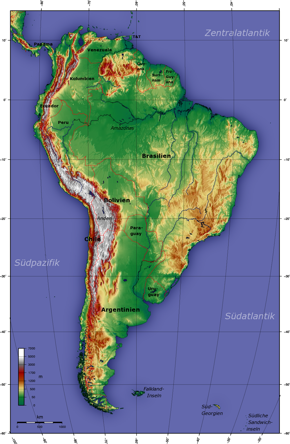 Topografische Karte von Südamerika